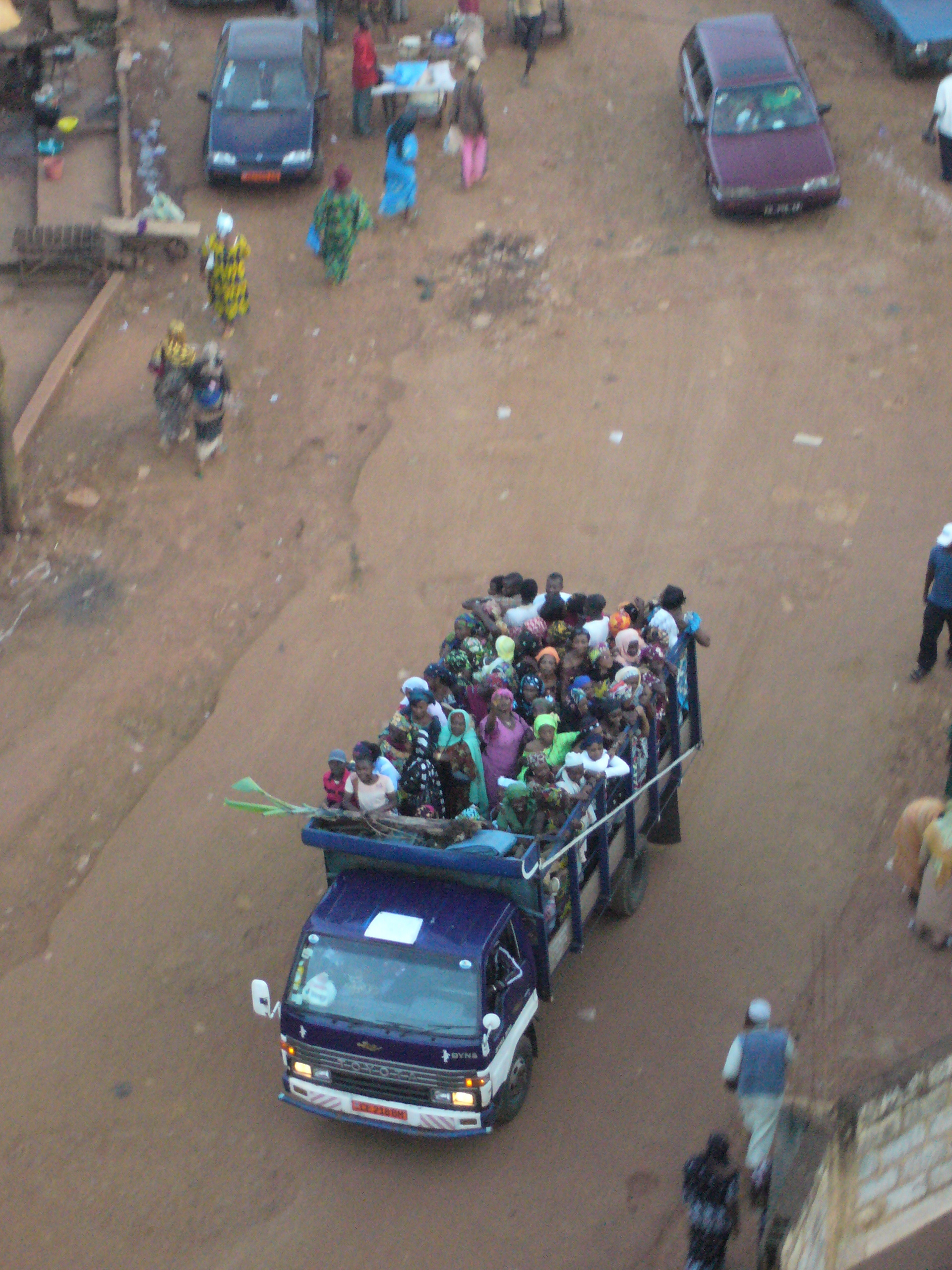 Cameroun - Foumban - Les invités d'un mariage en cortège, vus du minaret This is an image with the theme "Africa on the Move or Transport" from: Cameroon